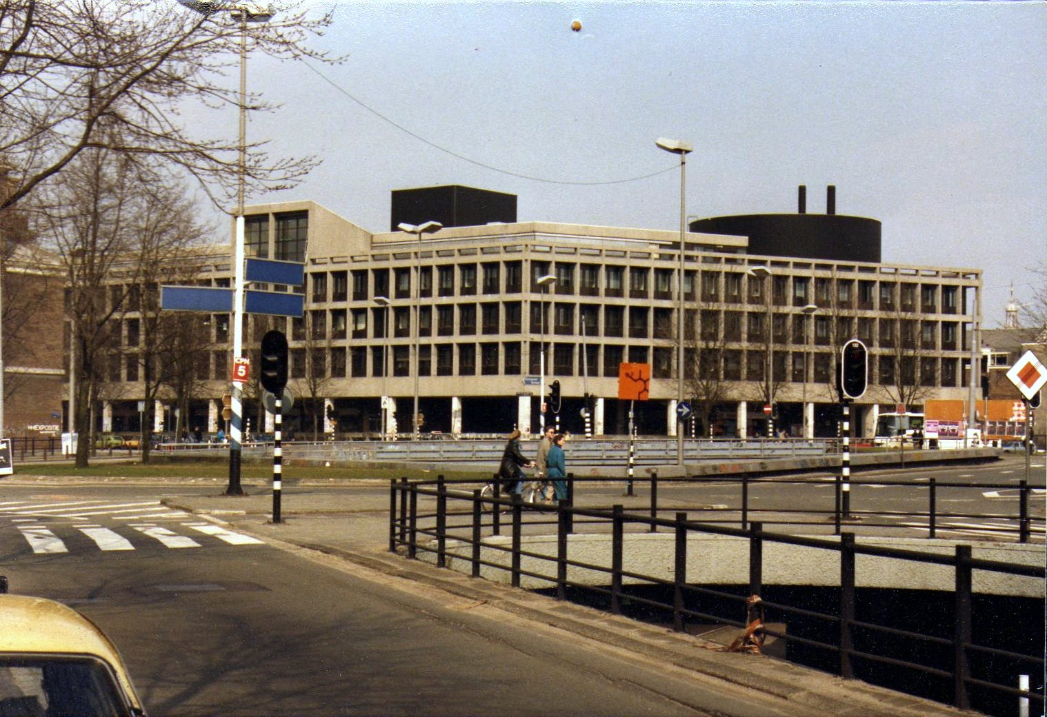 Het Burgemeester Tellegenhuis (beter bekend als het Maupoleum), gezien van het Mr. Visserplein; de groene stalen balk is van brug 85.